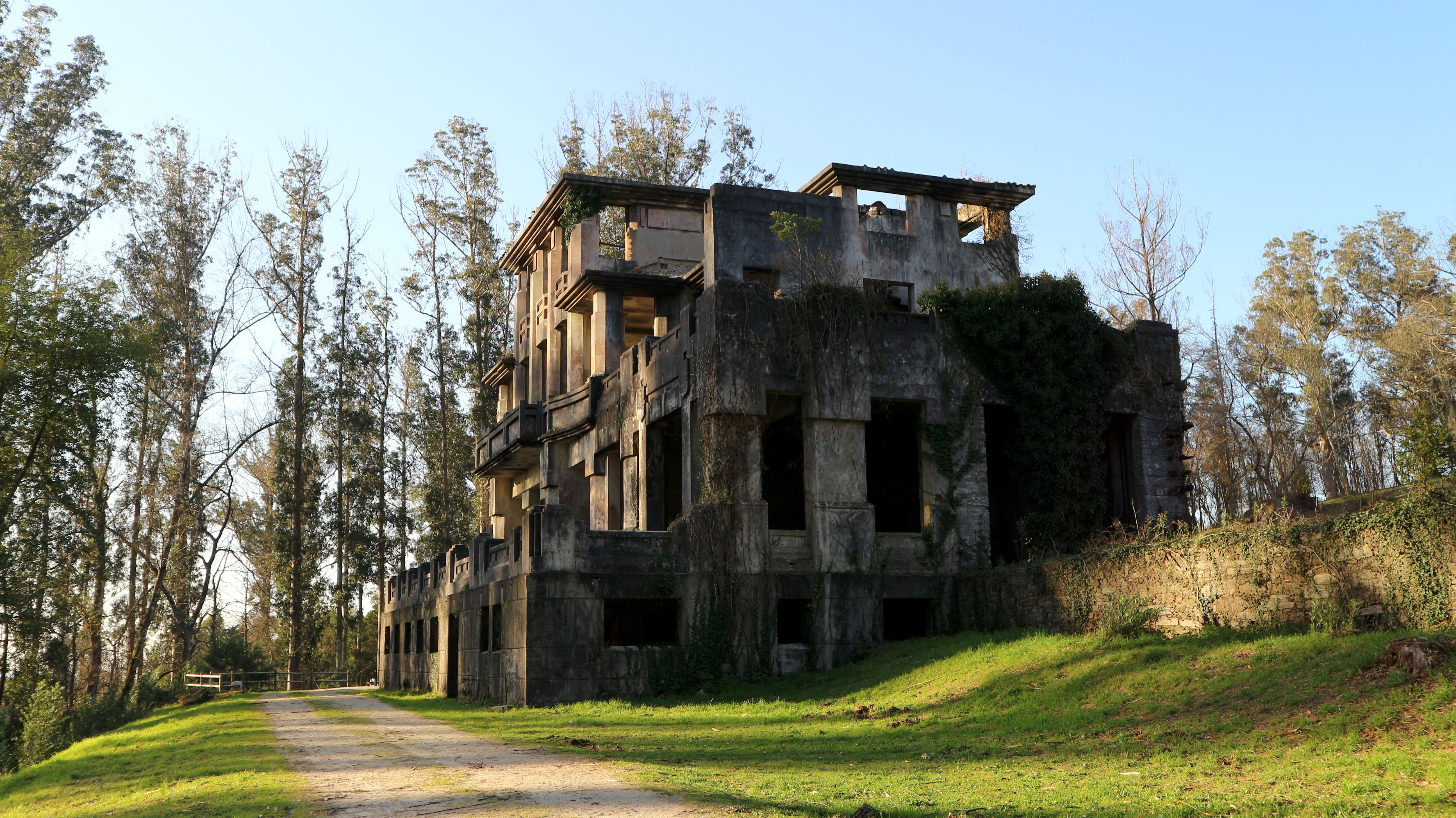 Antigo sanatorio tuberculoso de Cesuras. O Paraxón, Bragade, Cesuras.